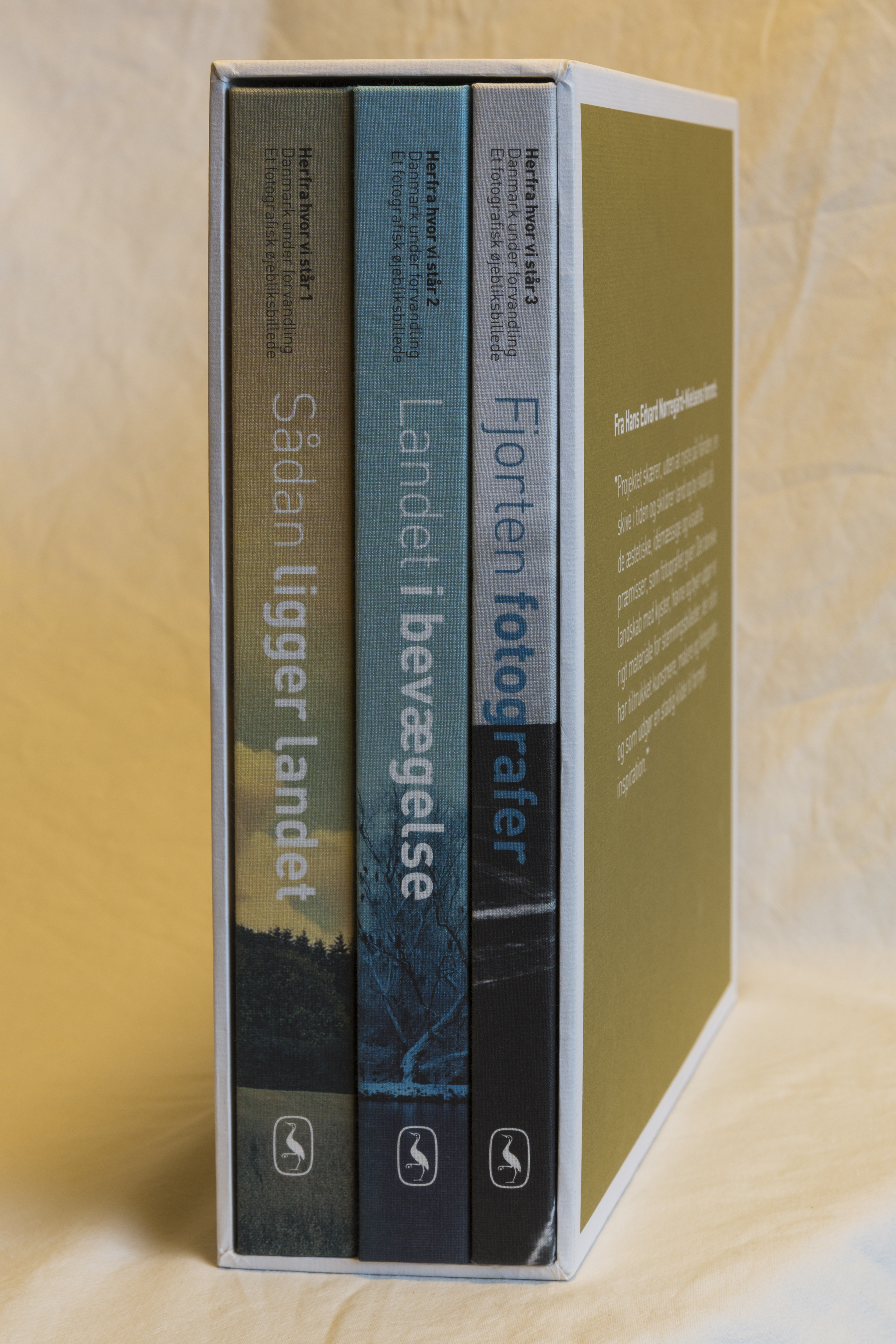 Bogkassette herfra hvor vi står